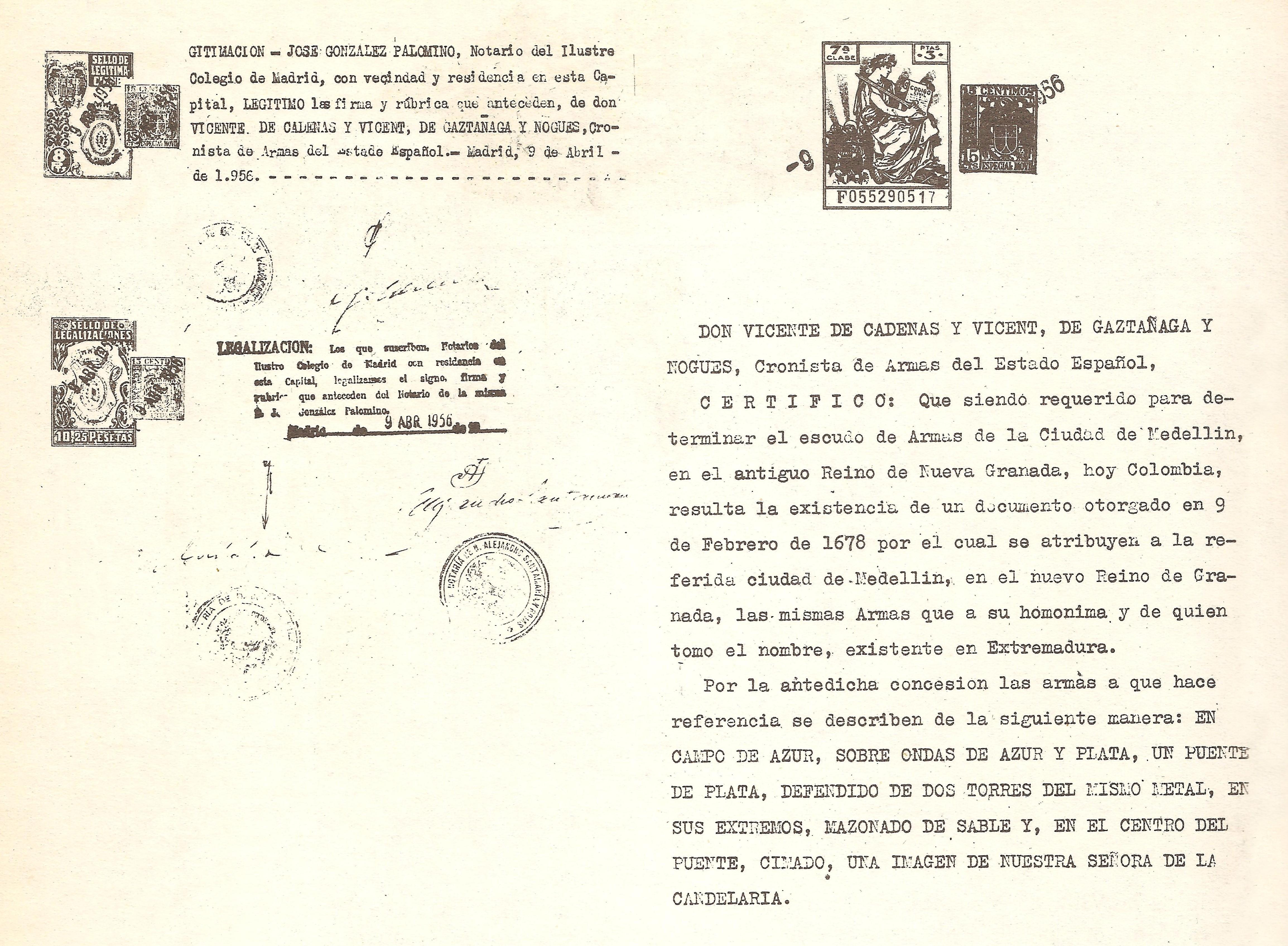 Fotografía del Certificado notarial de las armas de Medellín según las investigaciones de Vicente de Cadenas y Vicent, Cronista de Armas del Estado Español.